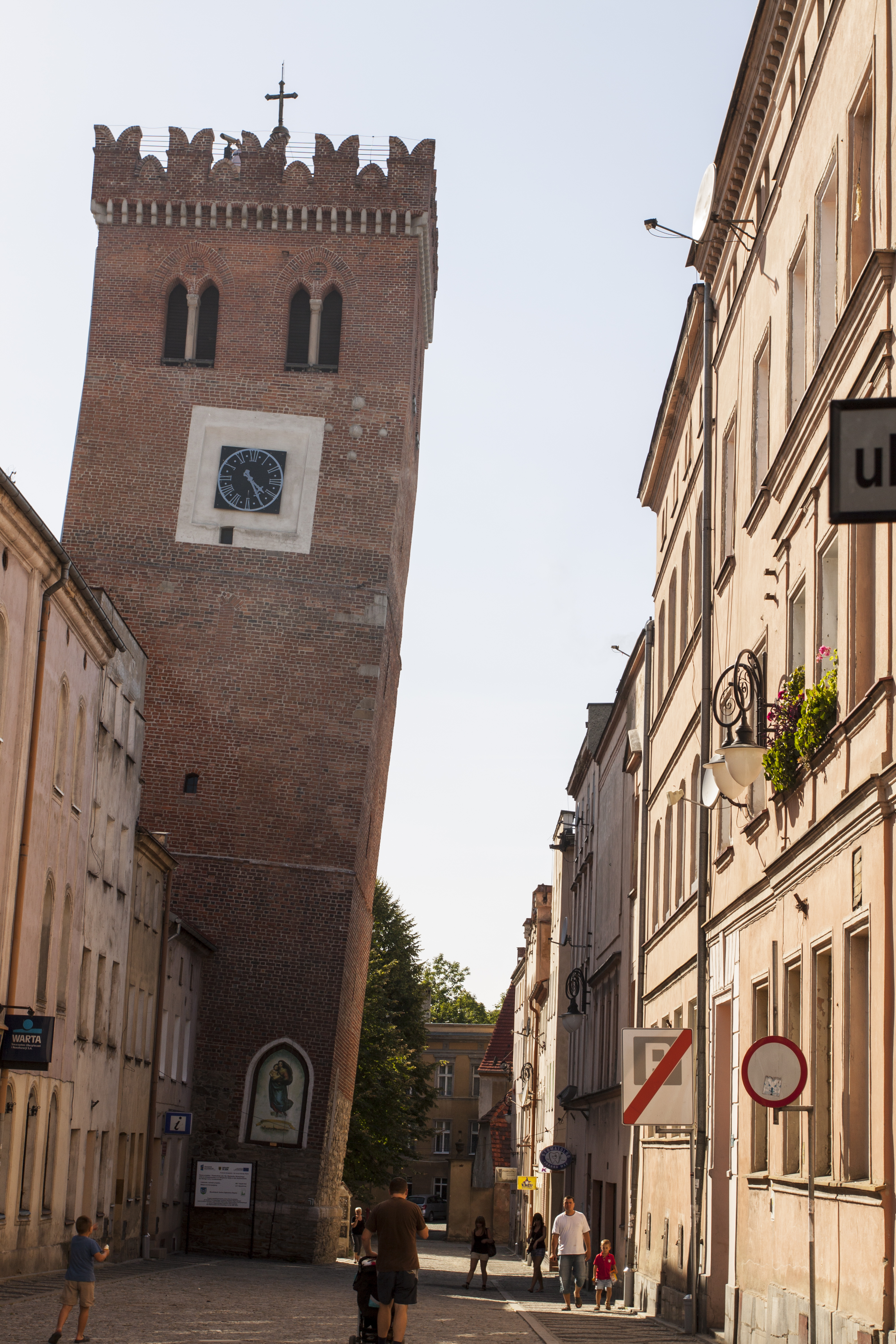 dzwonnica tzw. "Krzywa Wieża" przy kościele parafialnym Ząbkowice Śl., św. Wojciecha 7, Ząbkowice Śląskie